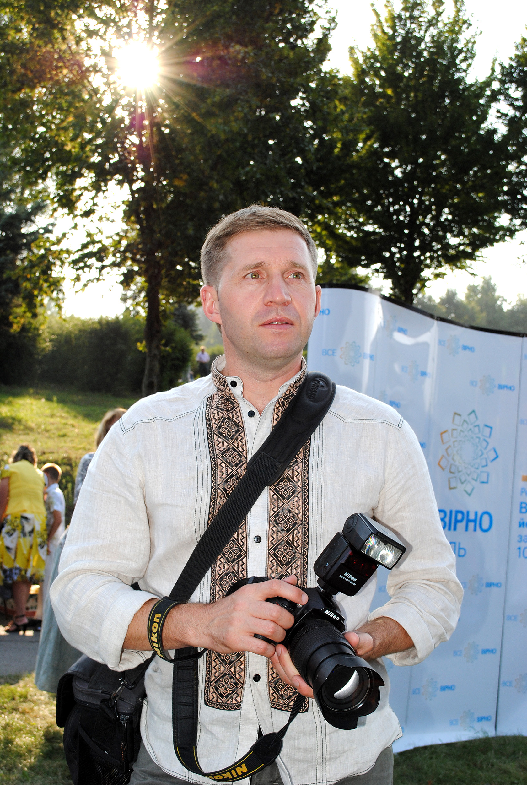 Український фотохудожник, фотожурналіст Михайло Урбанський у День міста Тернополя 28 серпня 2011 року.